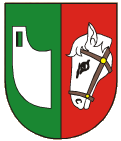 Znak obce Jarcová